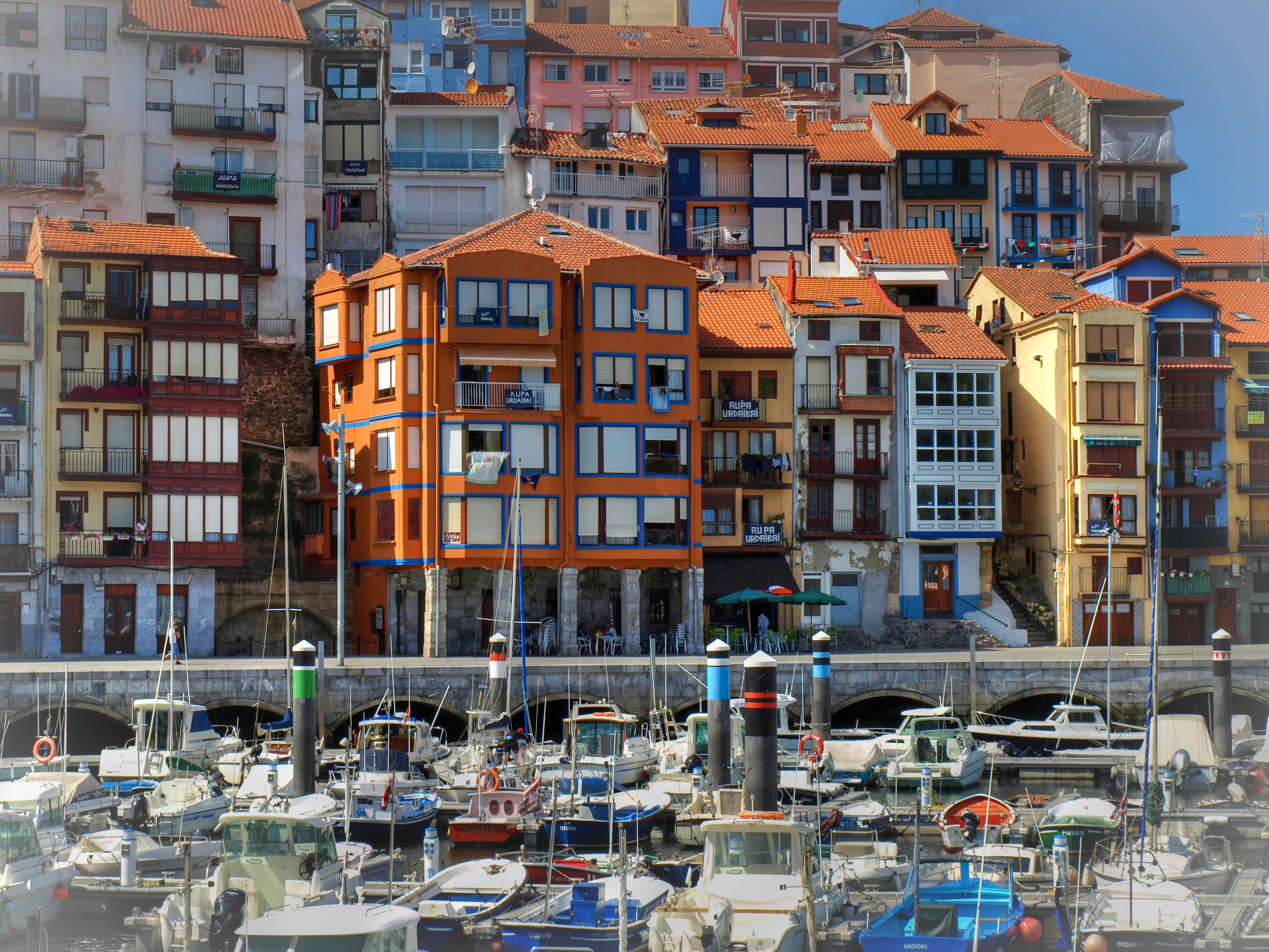 Puerto de Bermeo. La villa de Bermeo es un municipio de la comarca de Busturialdea, en la provincia de Vizcaya (España).